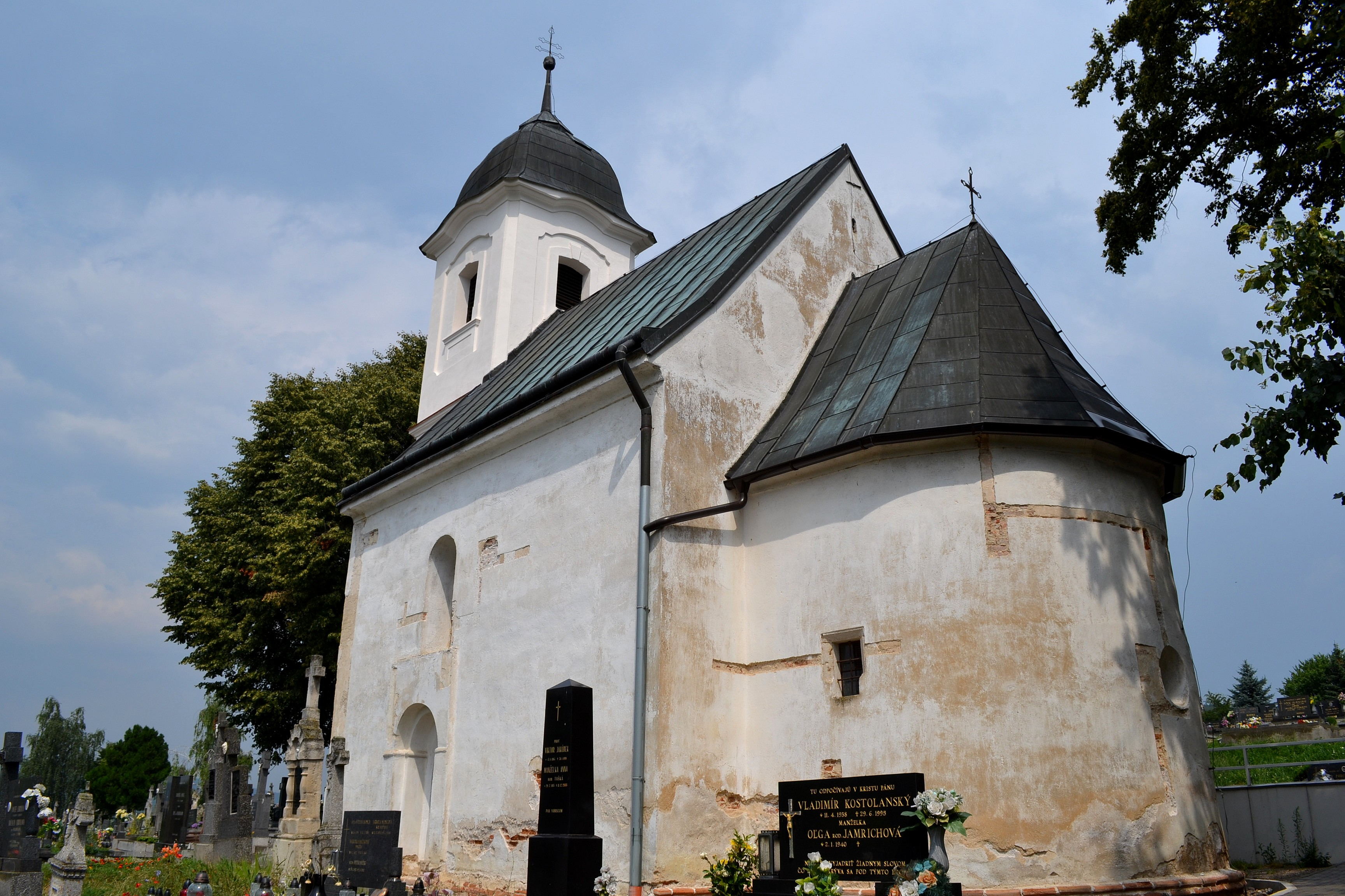 Románska Rotunda Všetkých svätých v Dechticiach. Románska stavba zo sedemdesiatych rokov 12. stor., v roku 1741 barokovo prestavaná